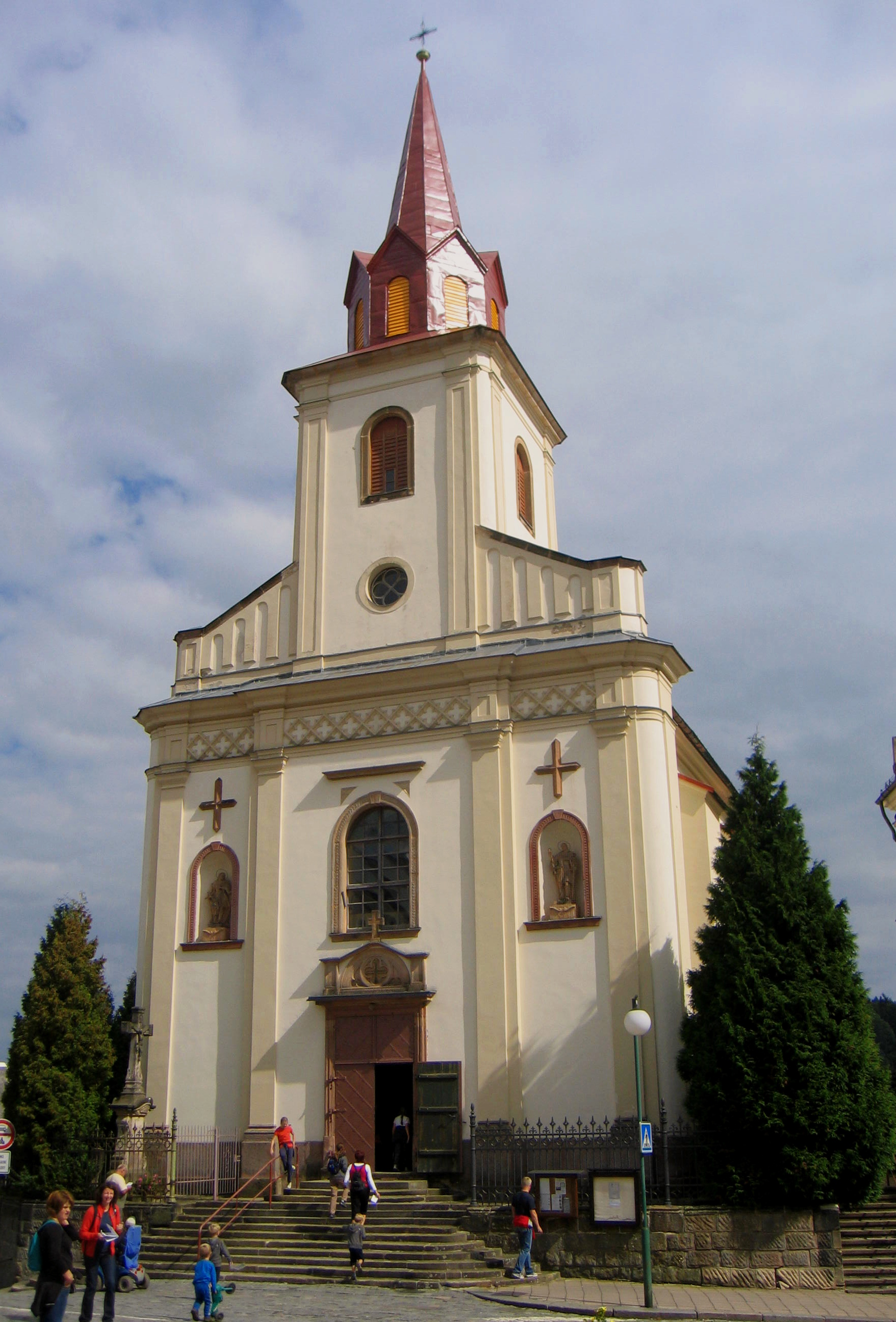 Kostel sv. Mikuláše (Nová Paka), nám., Nová Paka